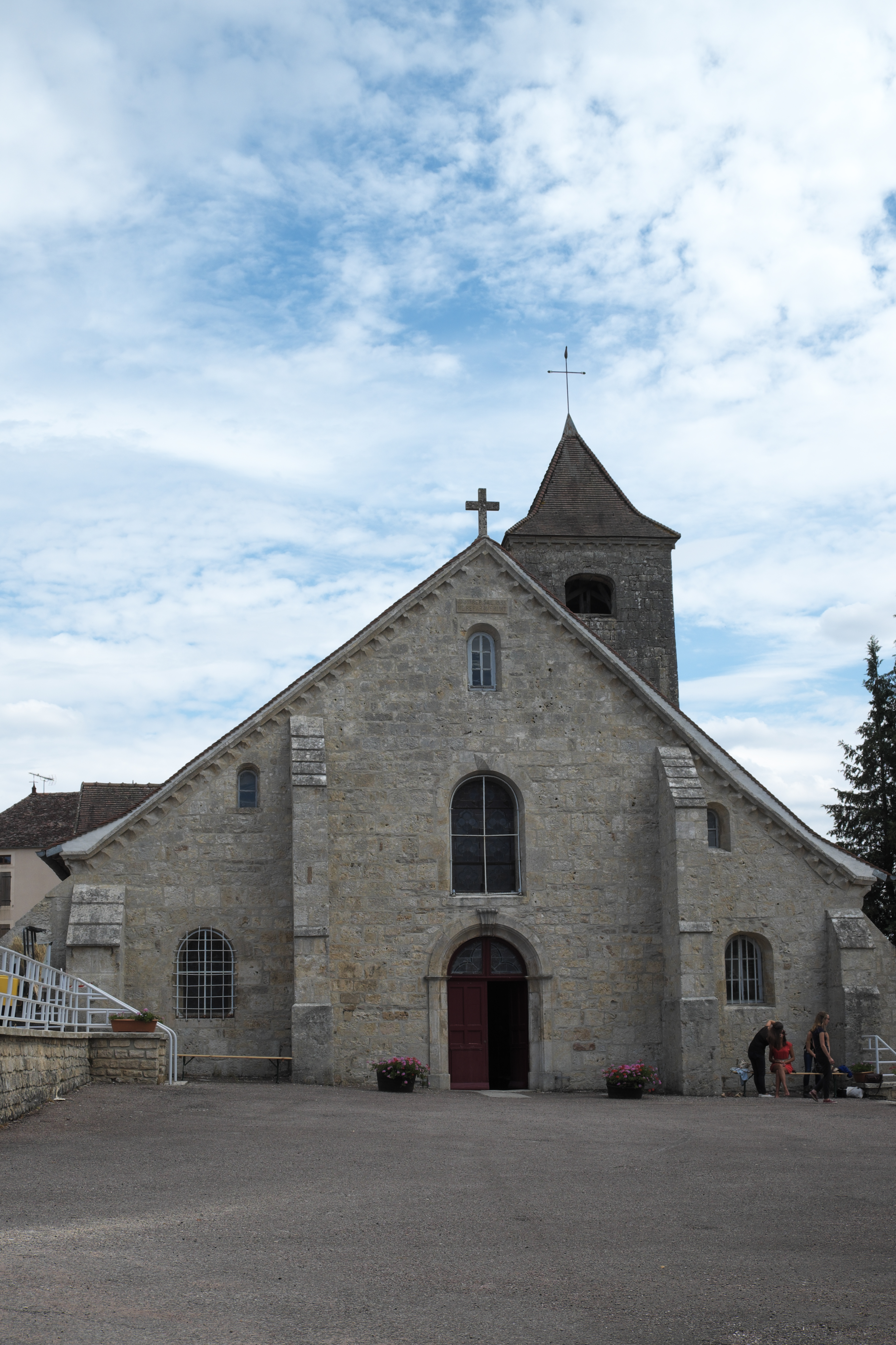 Katholische Kirche Saint-Rémy (Recey-sur-Ource) in Recey-sur-Ource im Département Côte-d’Or (Burgund/Frankreich), Westfassade